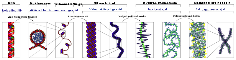 Kromatiini kõrgema struktuuri moodustumine.